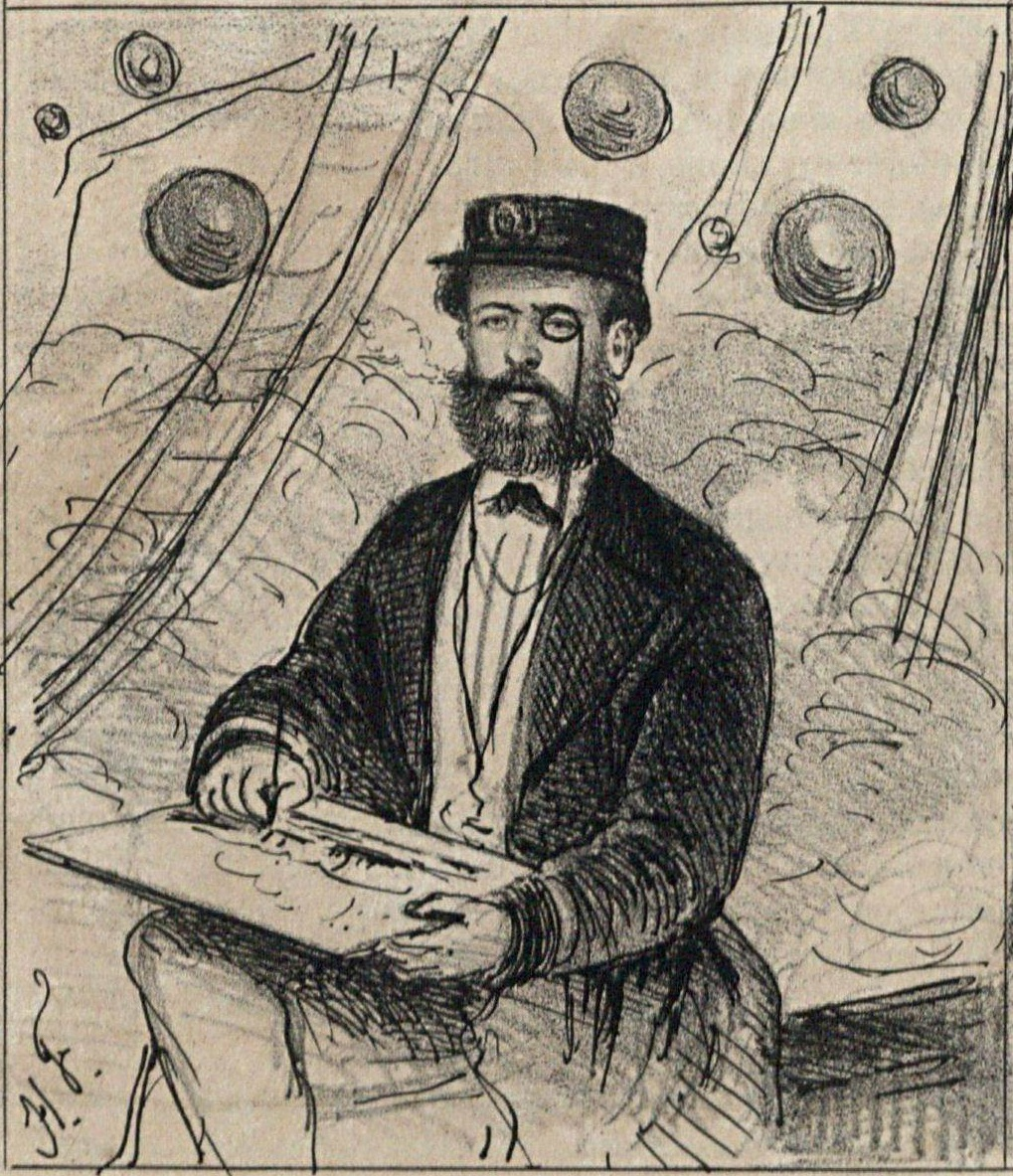 Antonio Luiz von Hoonholtz, comandante da canhoneira Araguary, passando as baterias de Cuevas e desenhando-as com o maior sangue frio.